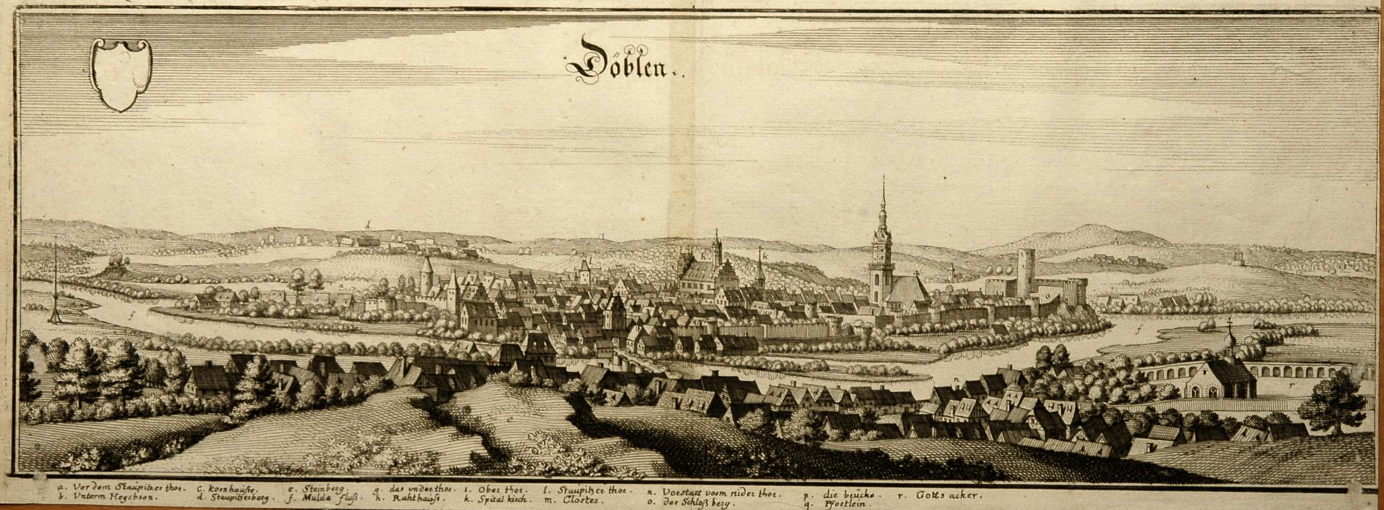 Döbeln um 1650; Kupferstich von Merian, 1650 13 x 37 cm